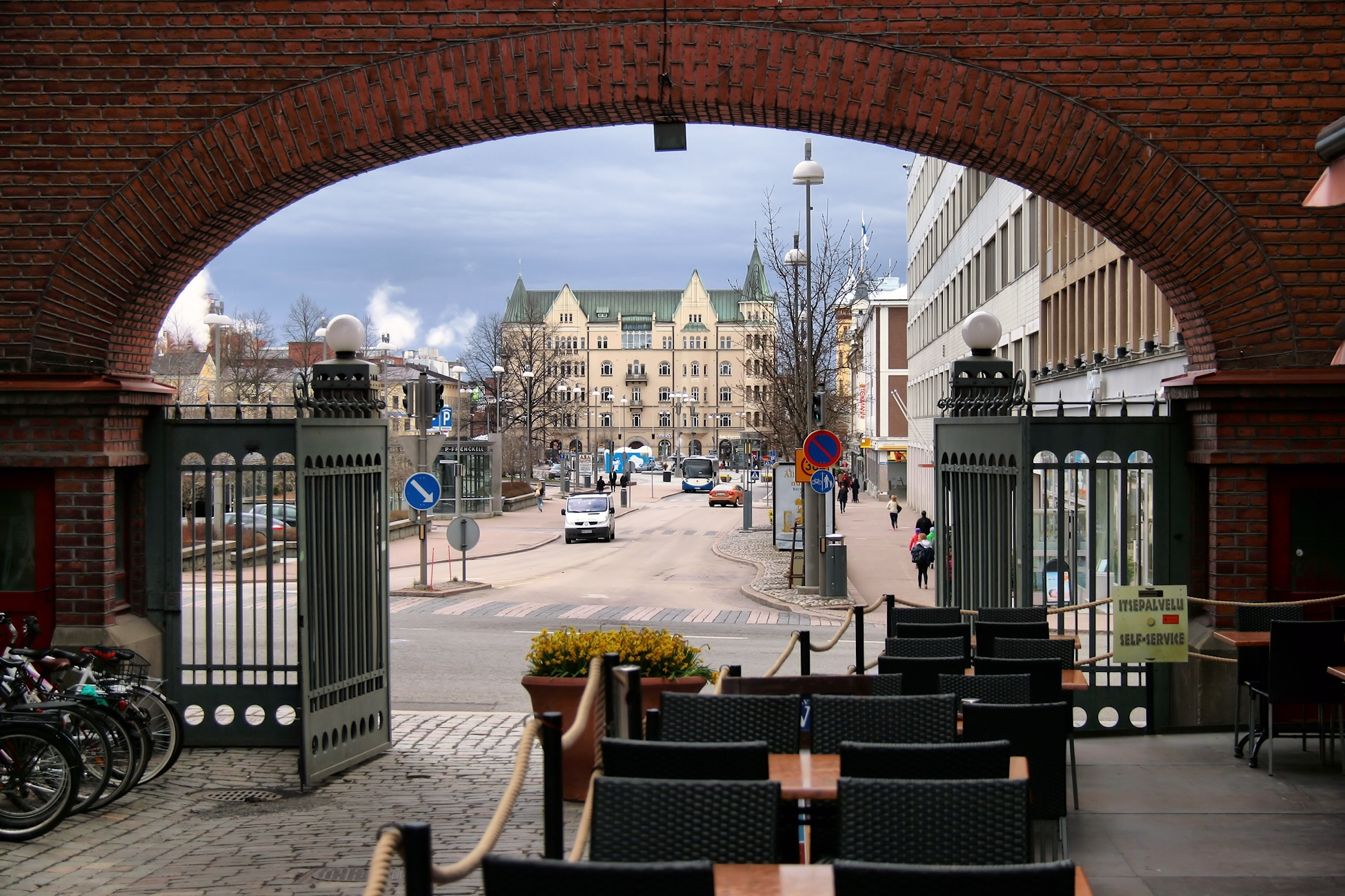 Tampere